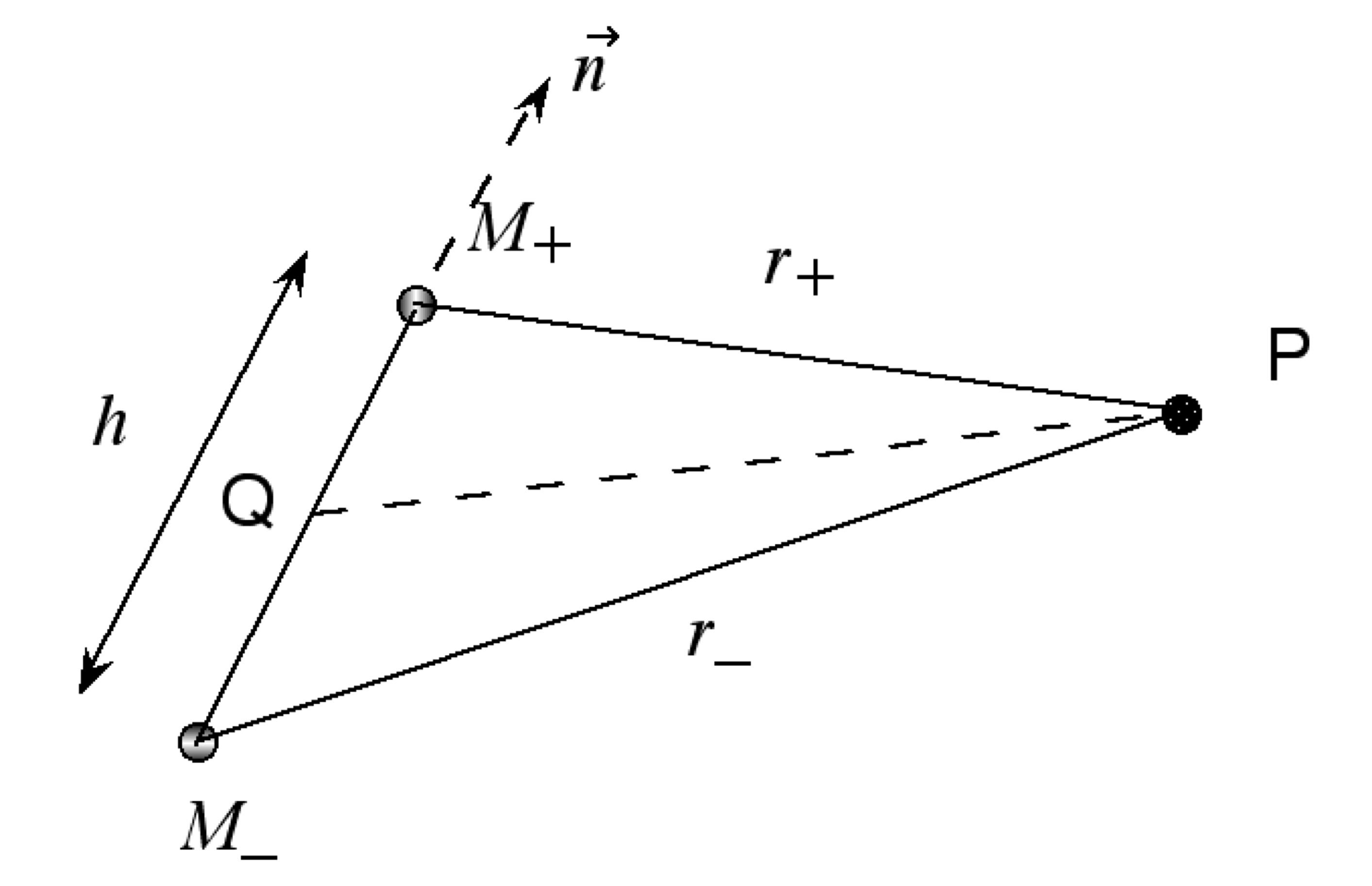 Graphique d'un dipôle pour illustrer l'article Géodésie physique. L'auteur de l'article original a produit lui-même ce graphique et le met dans le domaine public. Carlo Denis.